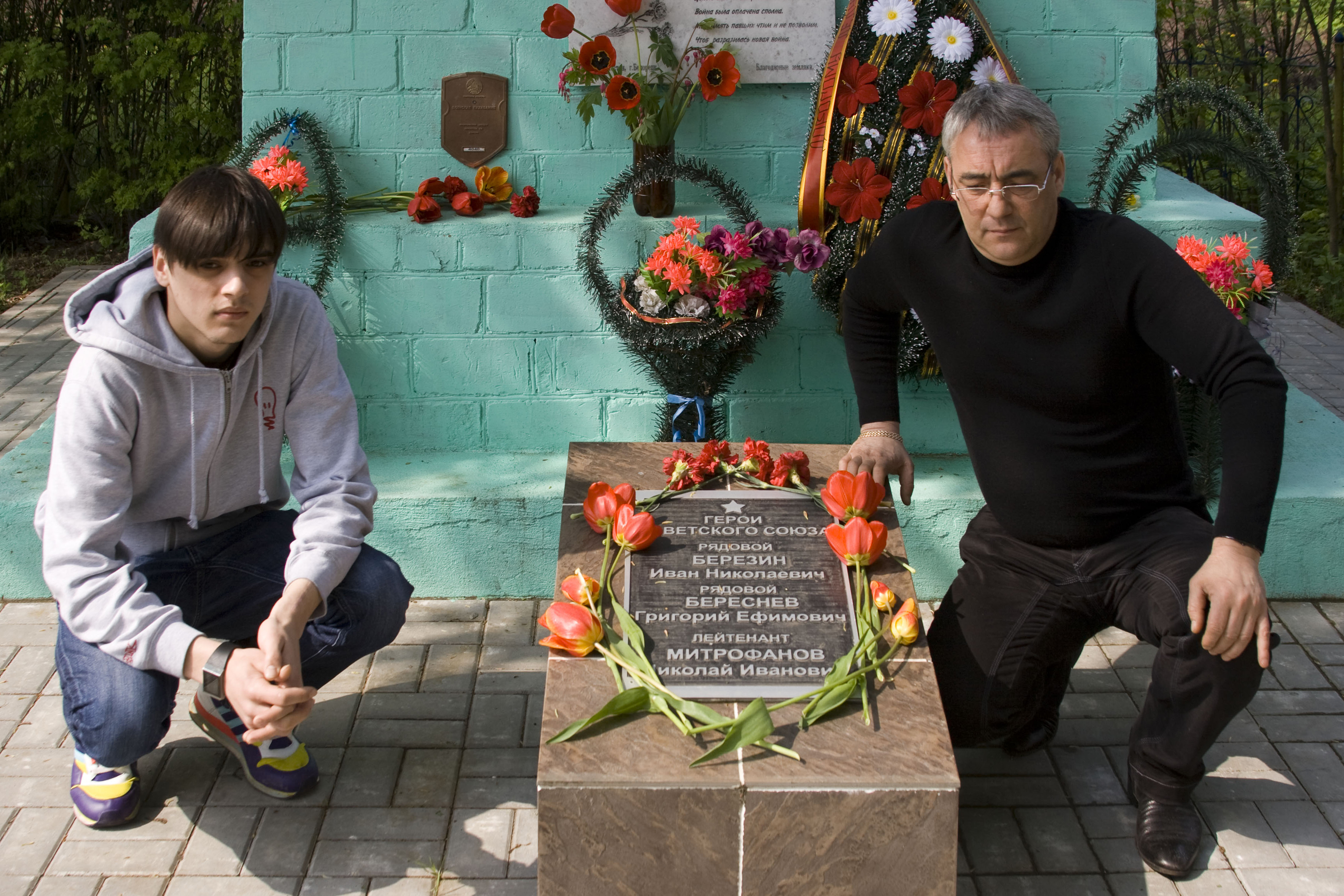 Правнук героя Попов Антон Сергеевич, внук героя Попов Сергей Витальевич